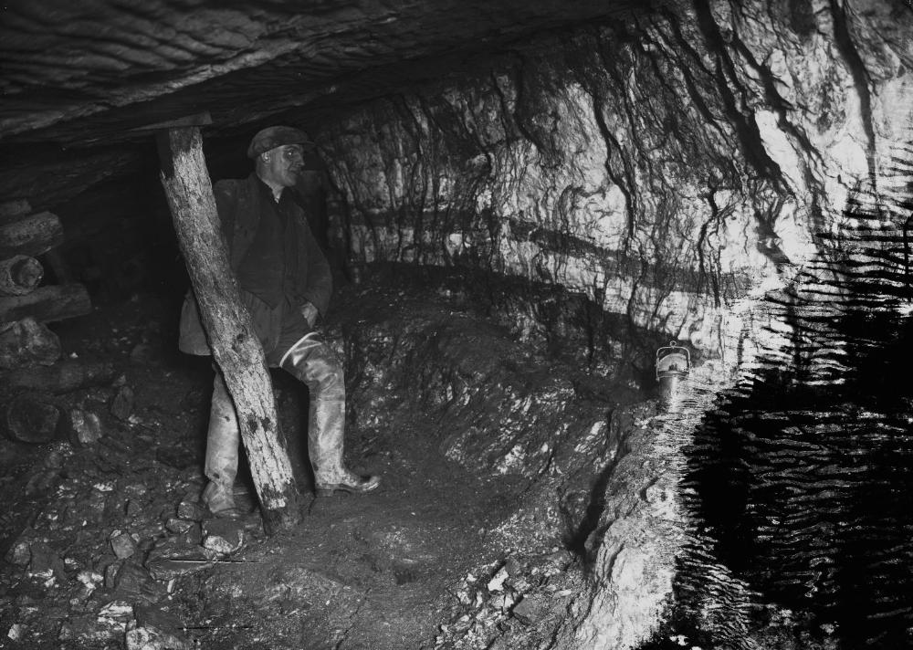 Abstract: Miner underground at Pumsaint gold mine